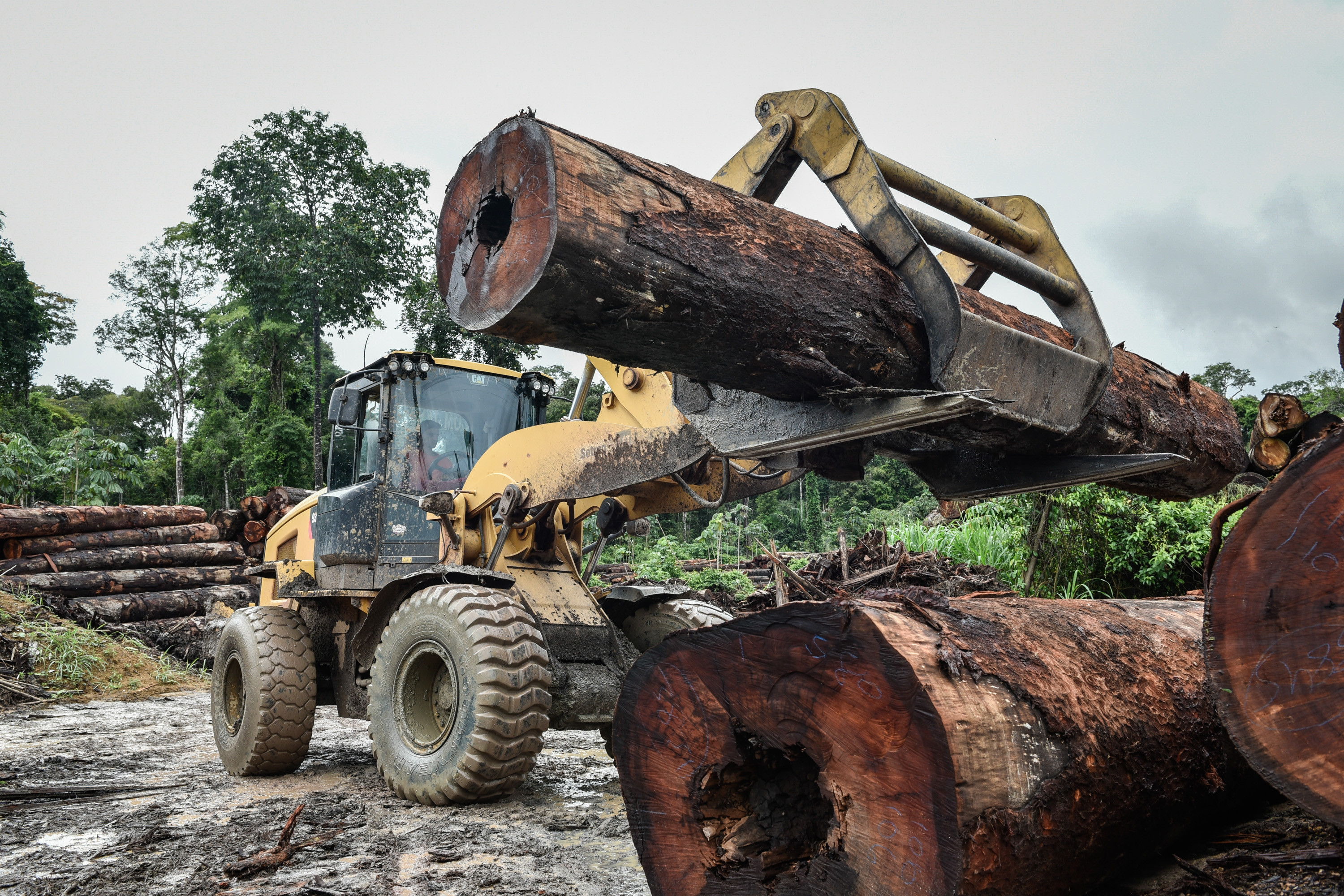 Ibama apreende 7.387 toras extraídas ilegalmente da Terra Indígena Pirititi, em Roraima Foto: Felipe Werneck/Ibama Mais informações